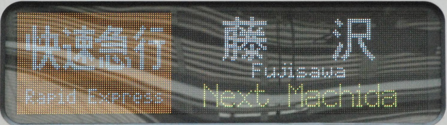 小田急5000形 LED方向幕(英語)